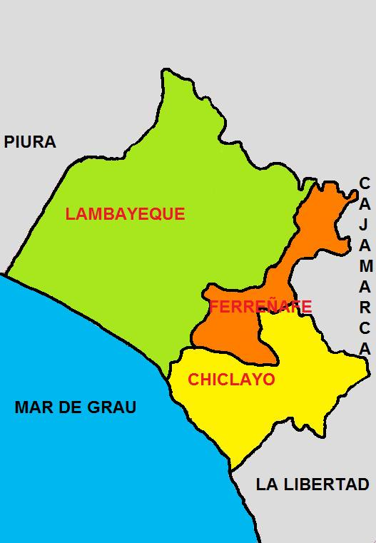 Imagen que muestra la División Politica del Departamento de Lambayeque, una de las 25 circunscripciones en que se divide el Perú